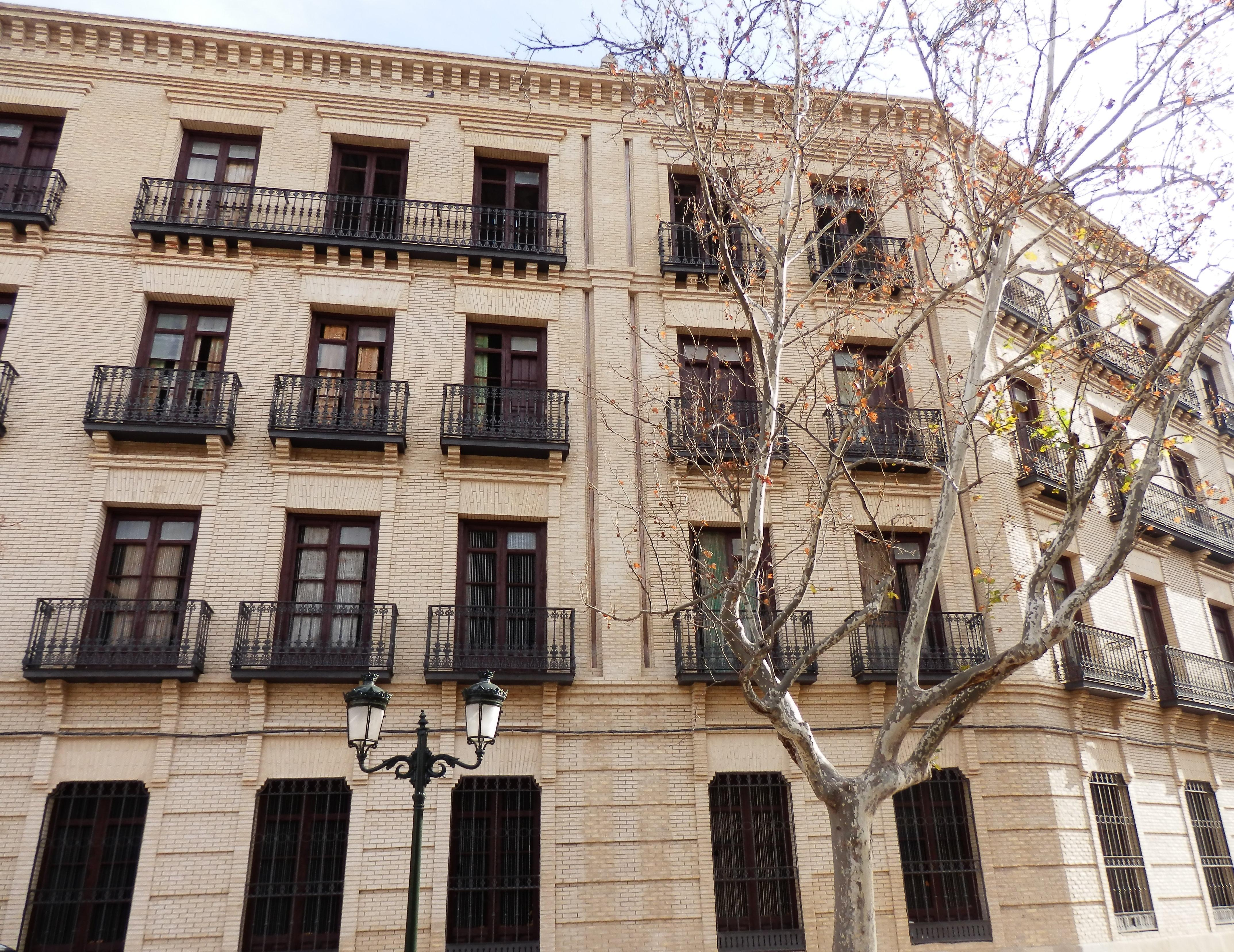 Edificio en la calle Madre Rafols, 8, de Zaragoza. Antigua calle Misericordia, 8. En este edificio vivió Amparo Poch desde 1916 hasta 1929. Era un edificio de residencia militar para los oficiales del cuartel de pontoneros.